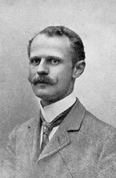 Réné Lemaire L. K., Épernay, la helpanto de s-ro de Beaufront.